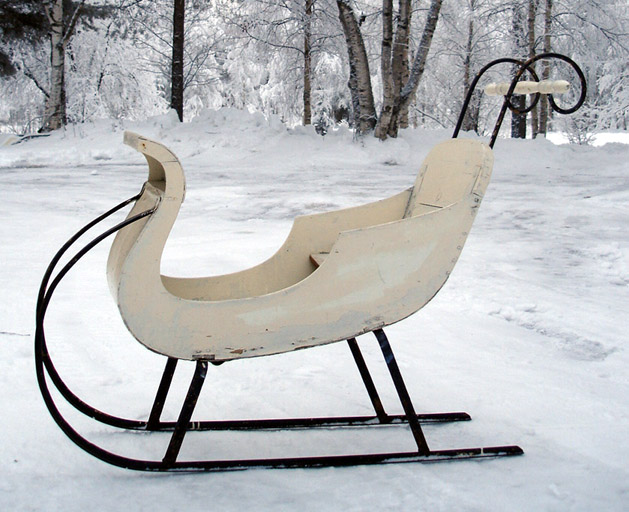 Sipikka-kelkka